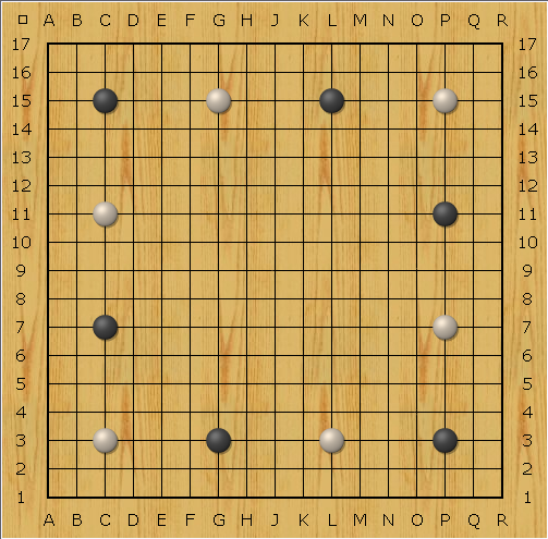 Тибетское го - доска и начальная позиция